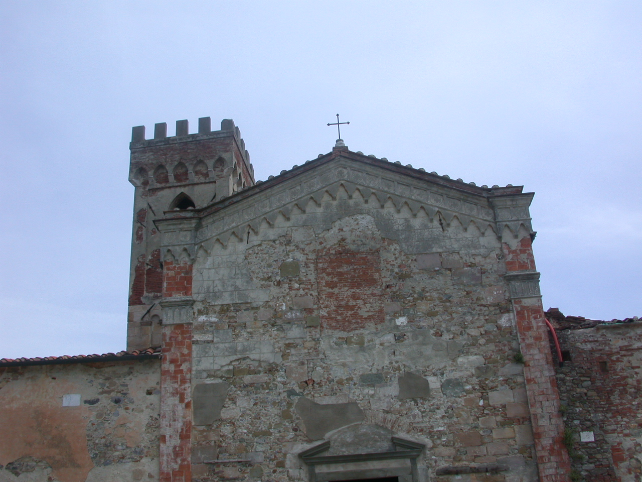 Badia Pozzeveri- la torre Licensing Categoria:Altopascio